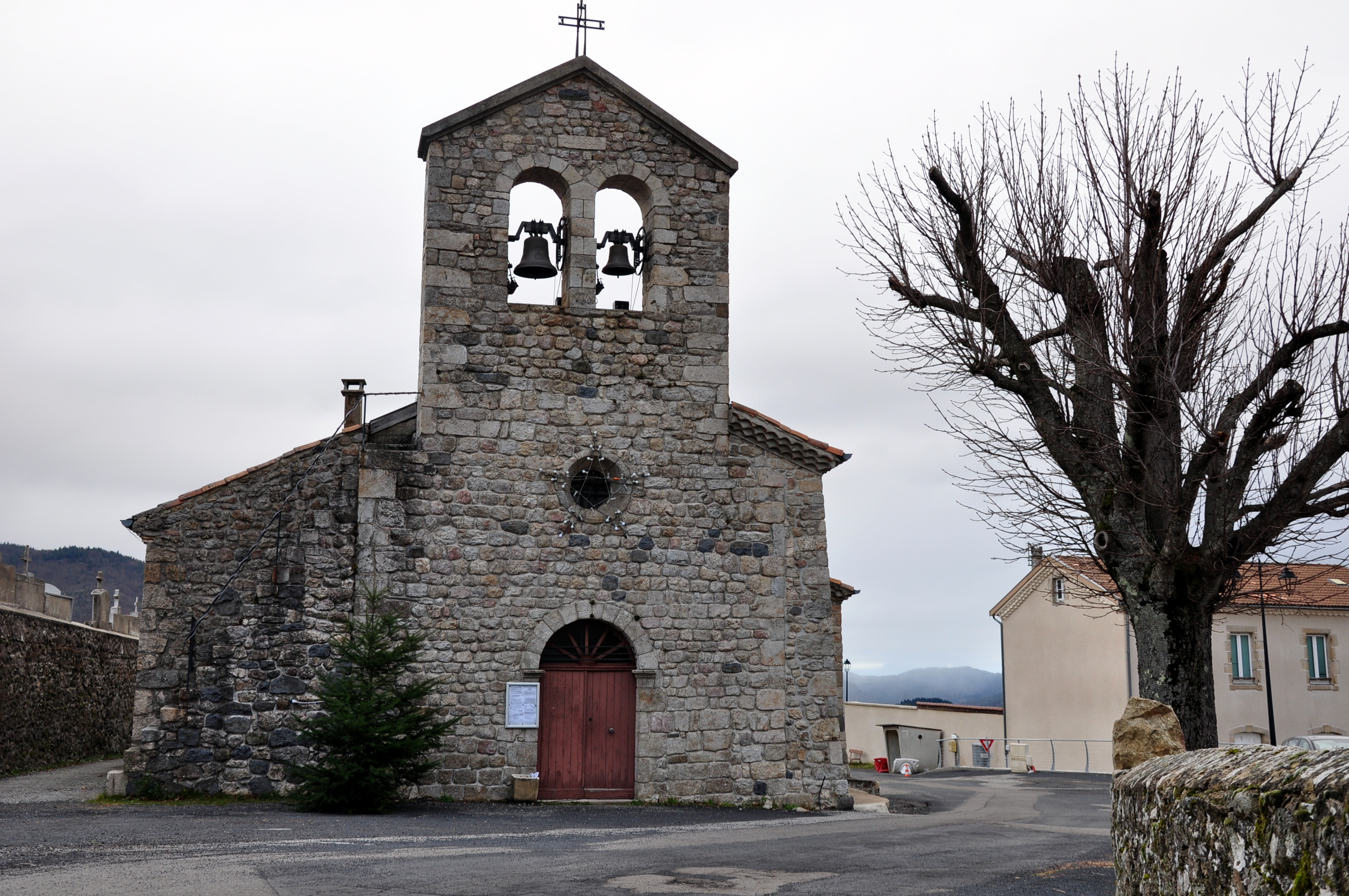 Eglise Saint-Michel de Saint-Michel-d'Aurance.